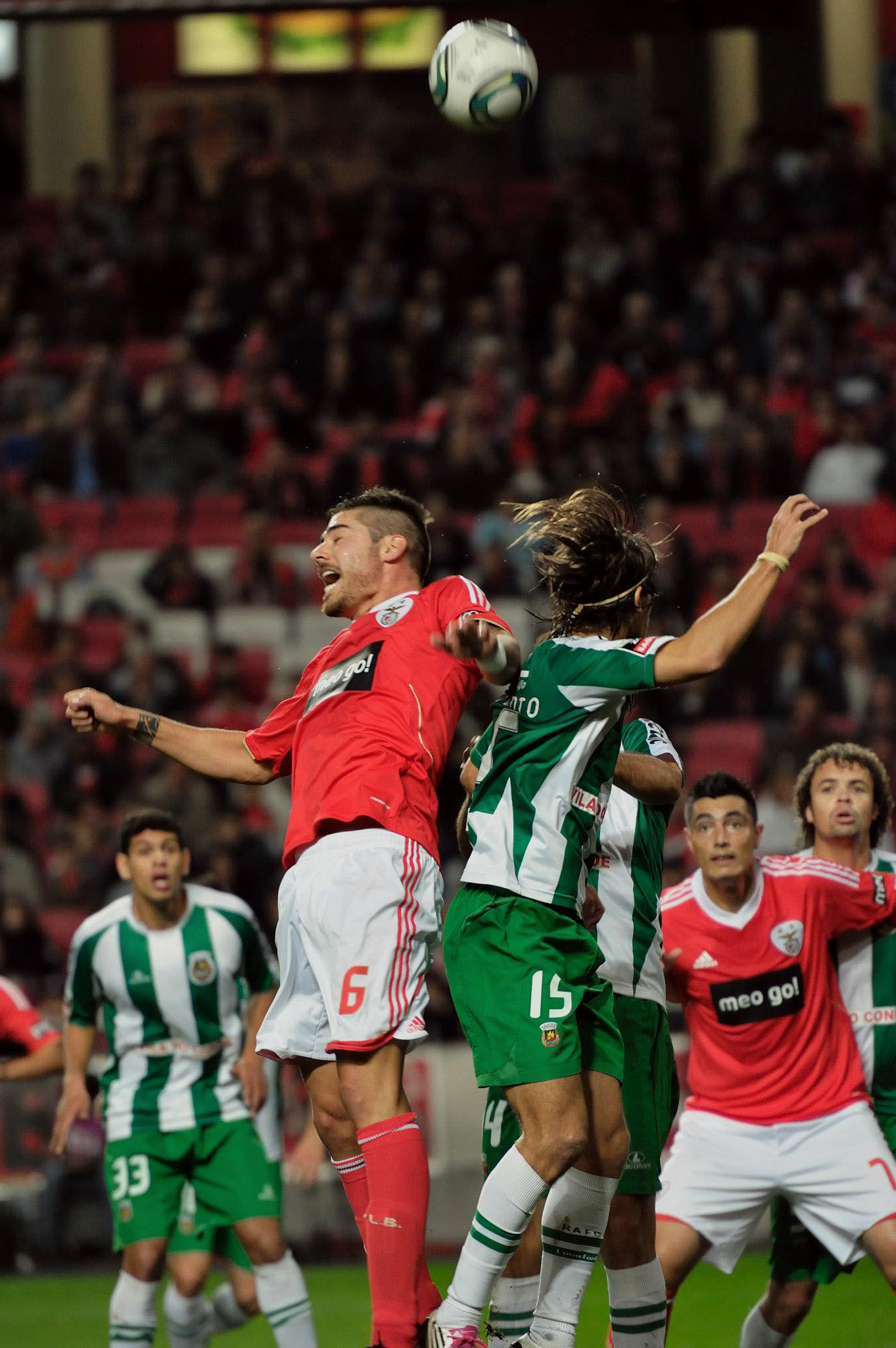 Javi García e Tiago Pinto